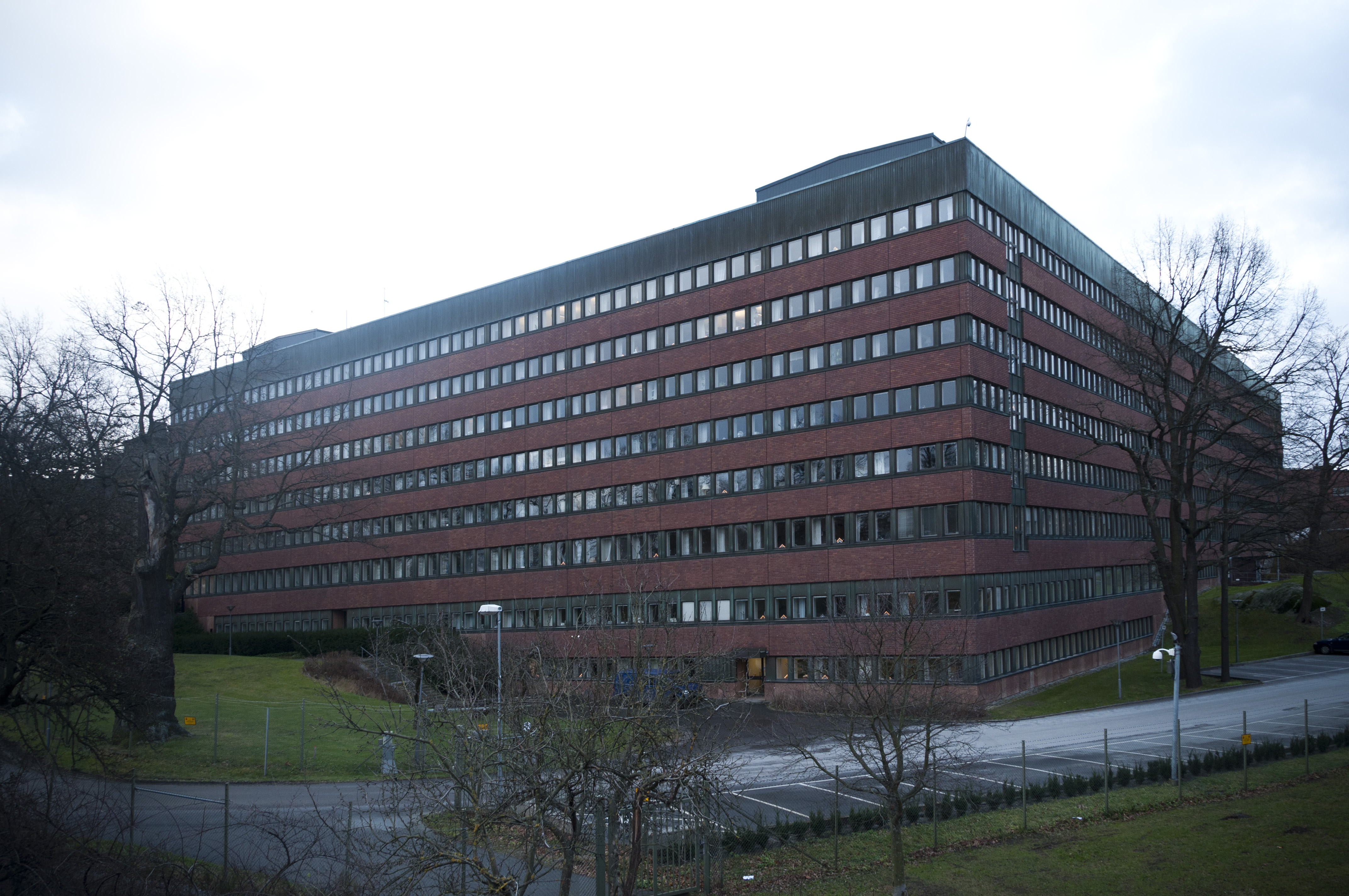 Lidingövägen 24, Försvarsmaktens högkvarter. Byggnadsår 1970 för Fortifikationsförvaltningen. Akitekt Bengt Gate